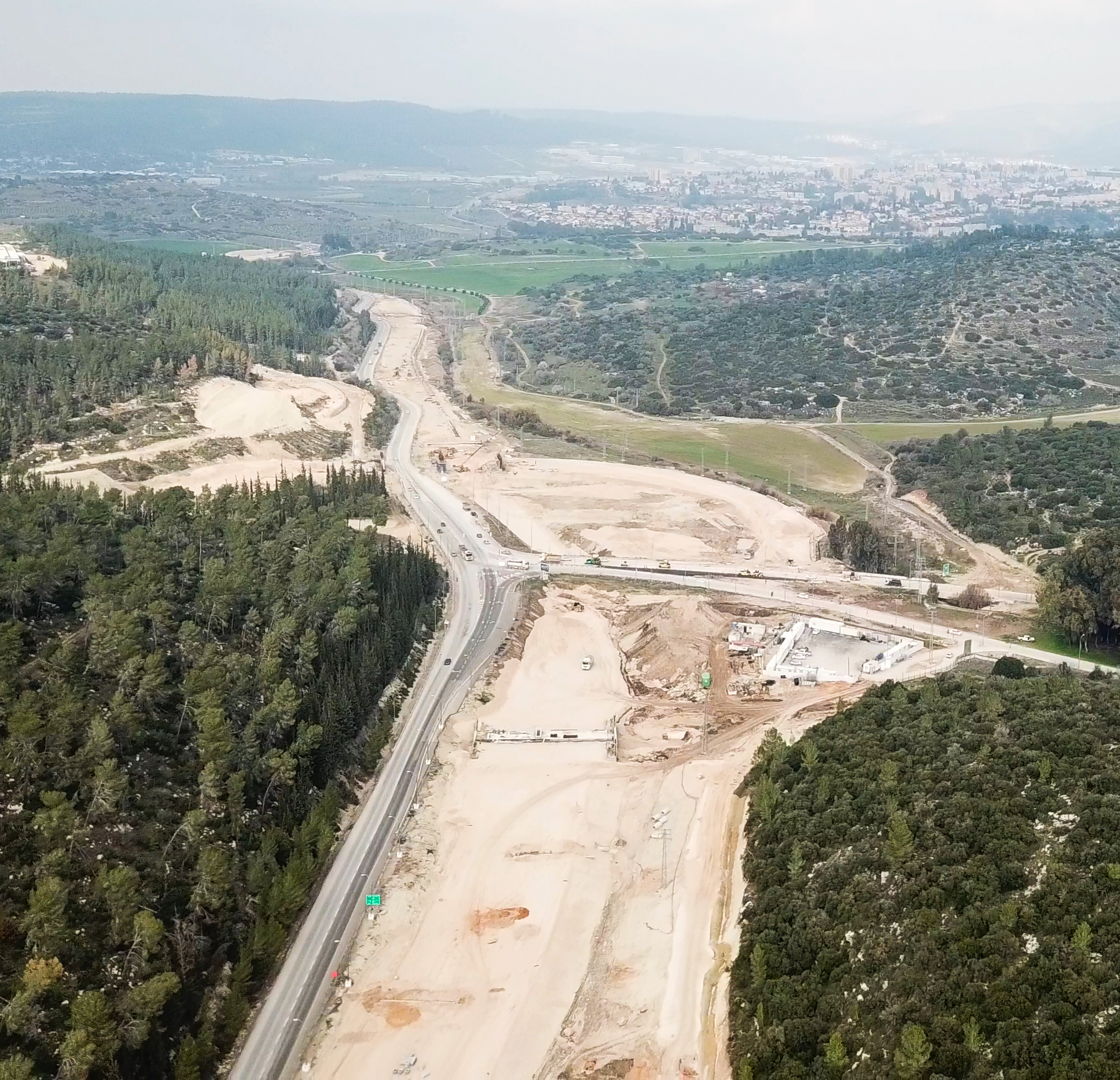 השיפוצים בכביש , צומת 38 צומת רמת בית שמש. שנת 2020